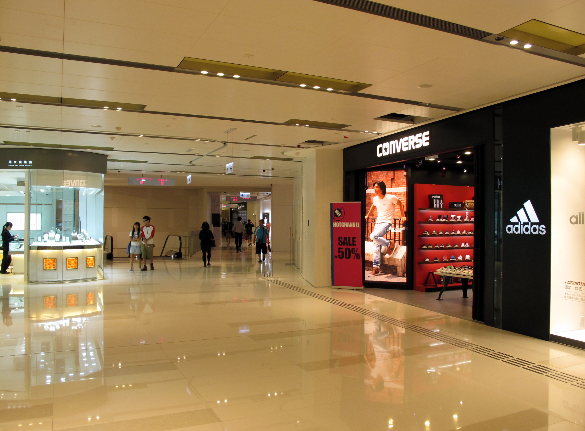 Mikiki MALL Ground Floor